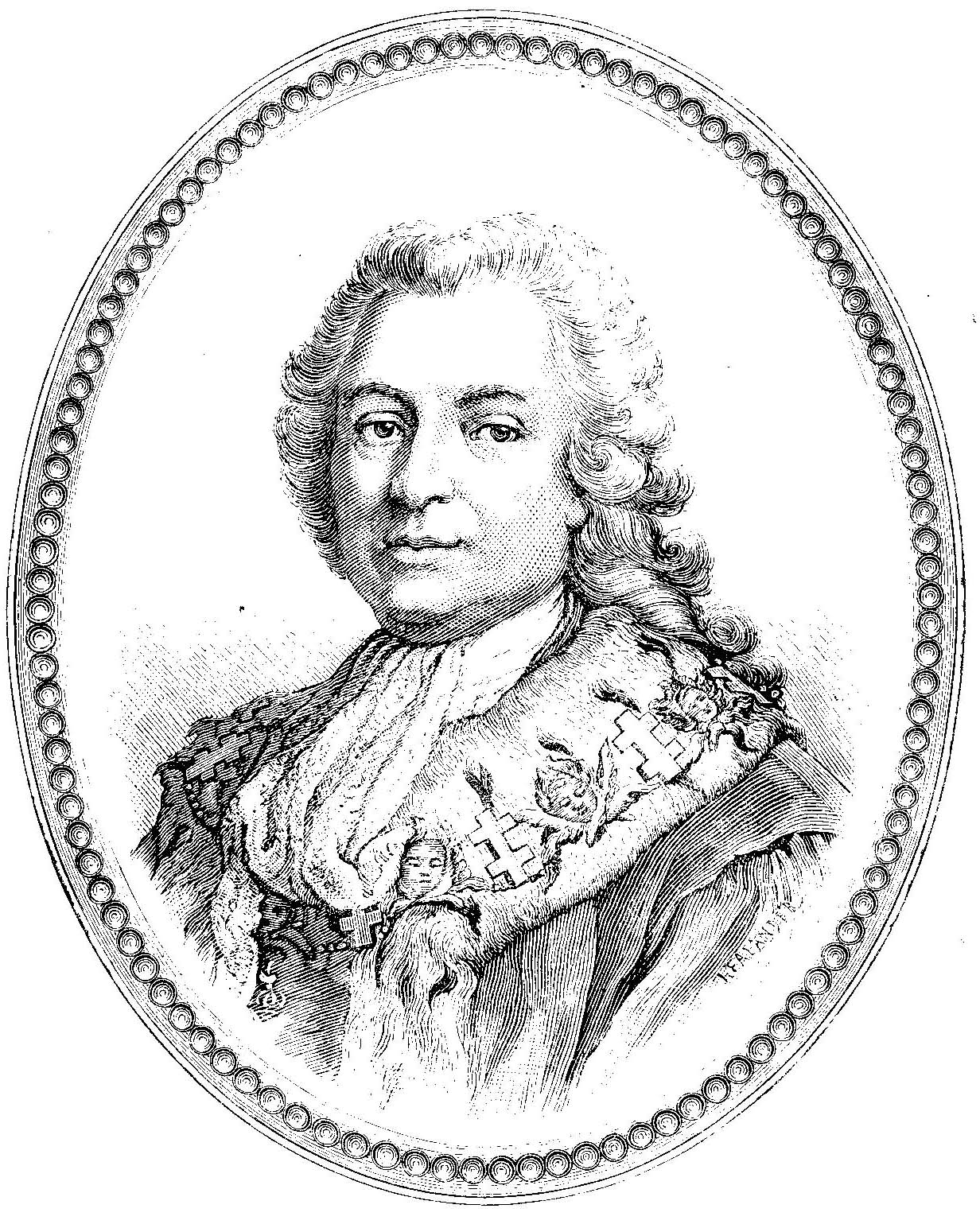 Anders Johan von Höpken. Bild ur planschverket Femtio porträtt af ryktbara svenskar (sent 1800-tal)